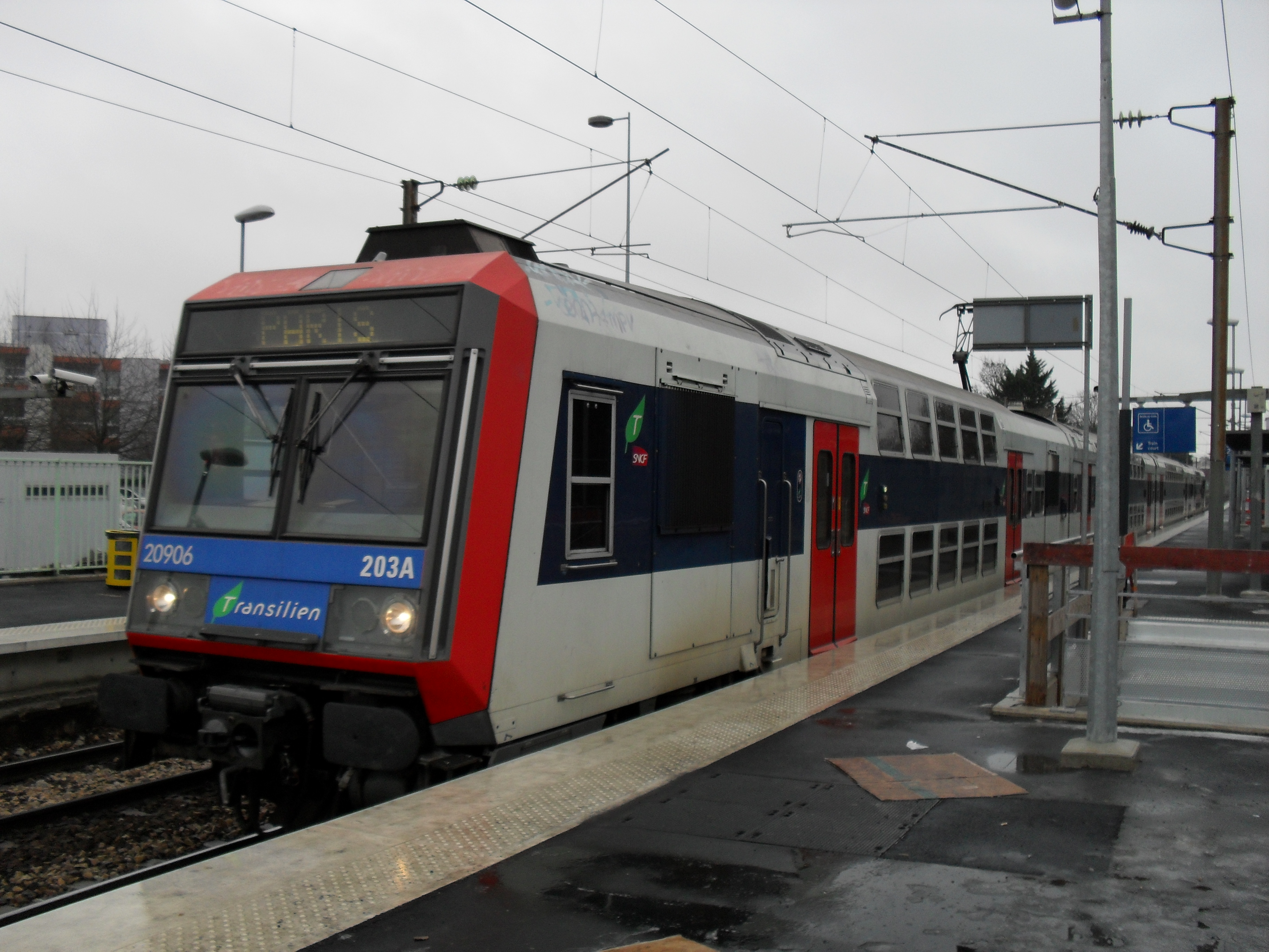 Z20900 à Groslay